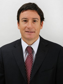 Arturo Squella Ovalle